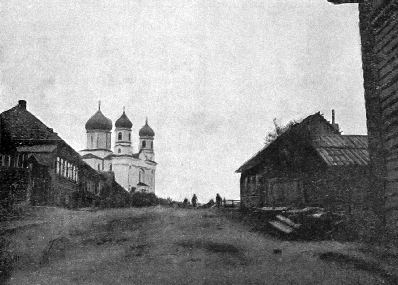 Беларуская (тарашкевіца): Кублічы (Kubličy). Касьцёл па маскоўскай перабудове